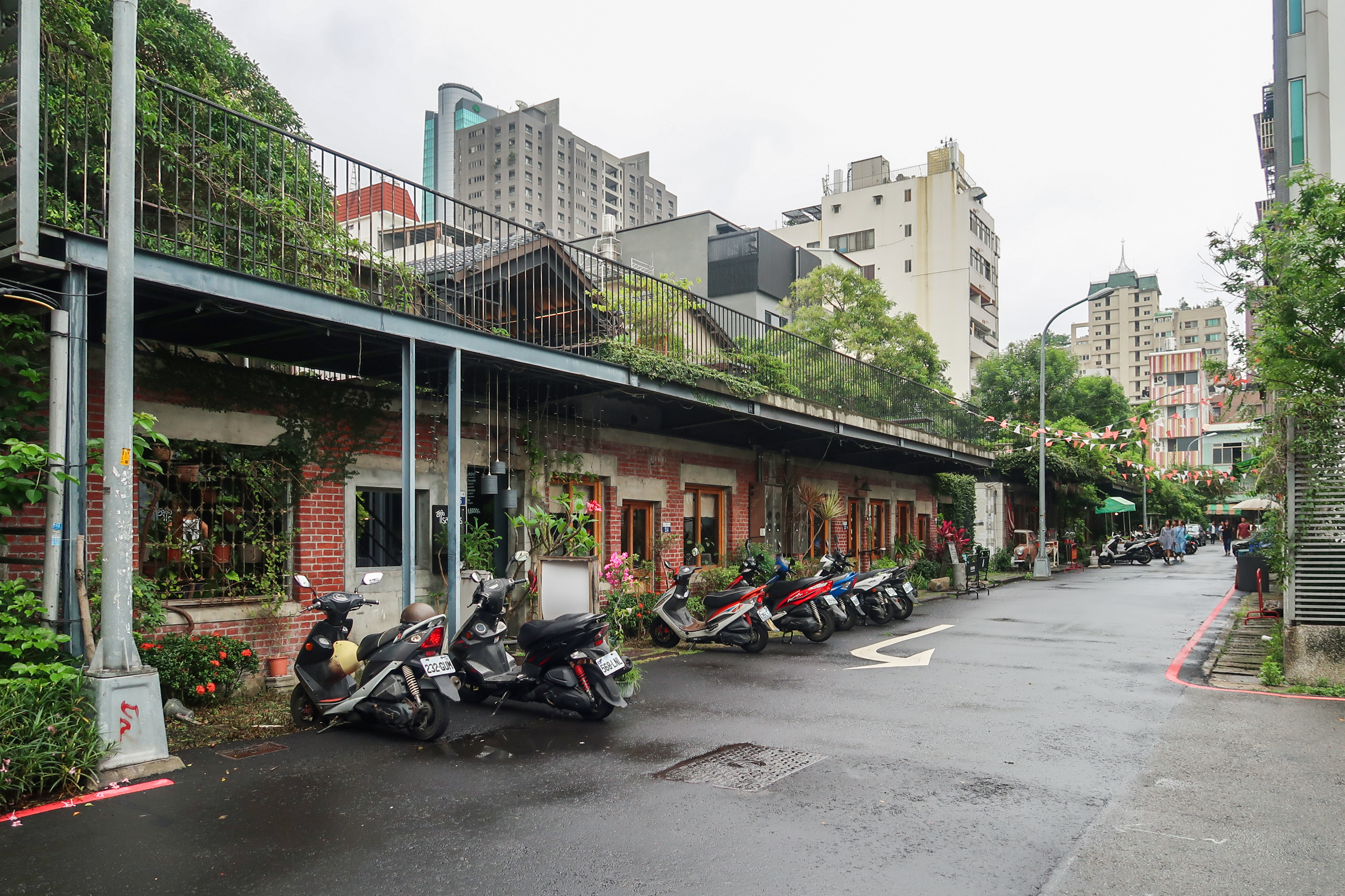 范特喜文創聚落 綠光計畫區